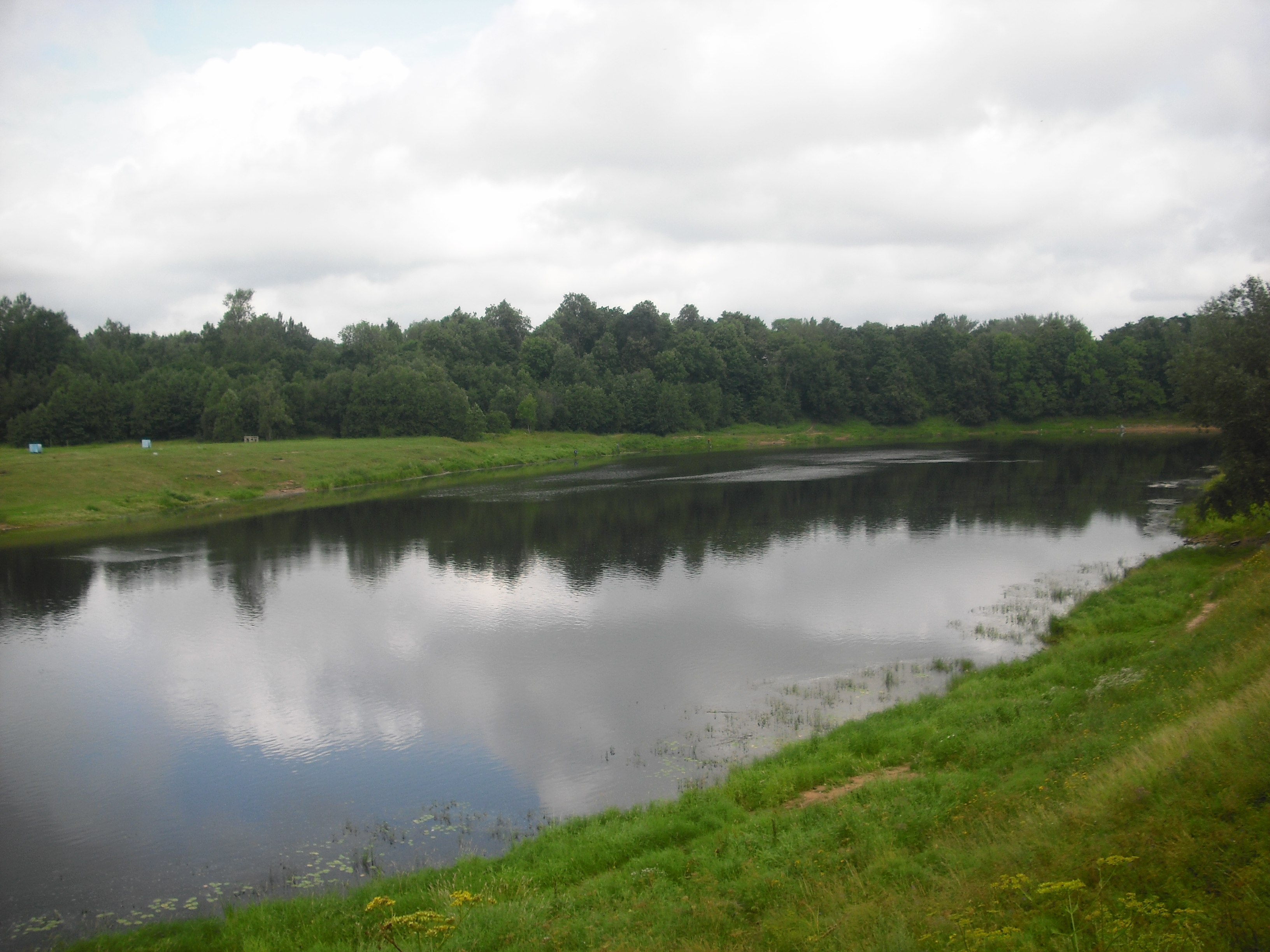 Река Луга в окрестностях Ямбурга (ныне Кингиссепп)